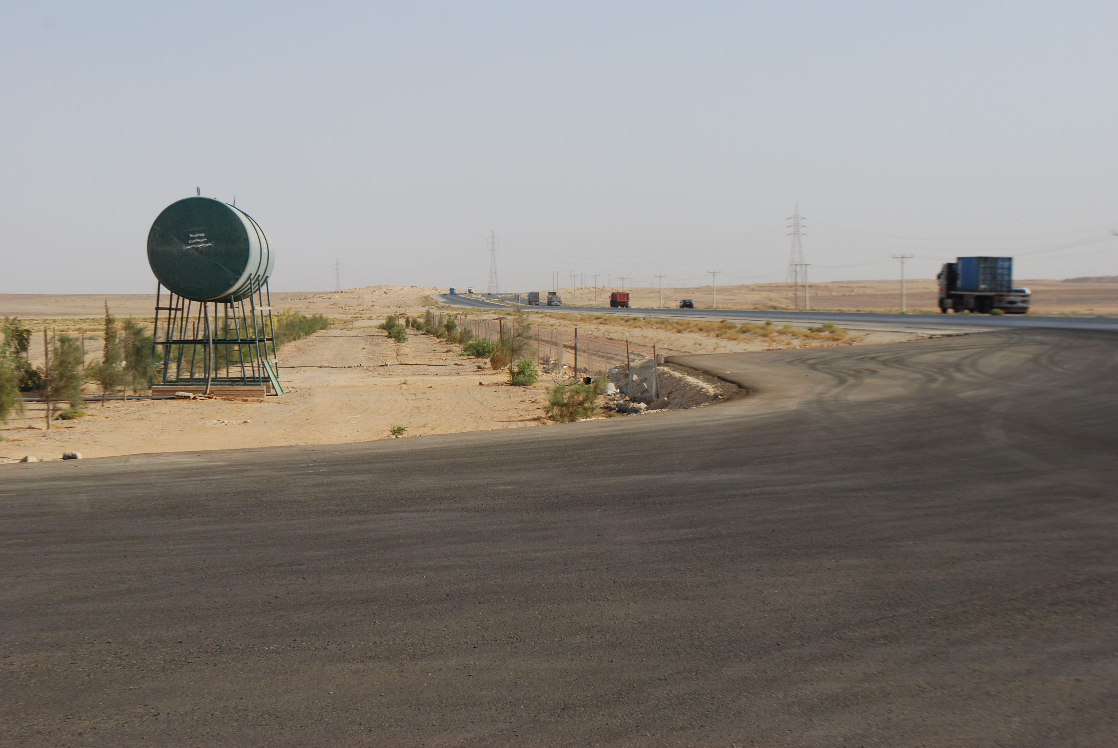 La route n° 15 Amman - Aqaba, vue vers le Nord.